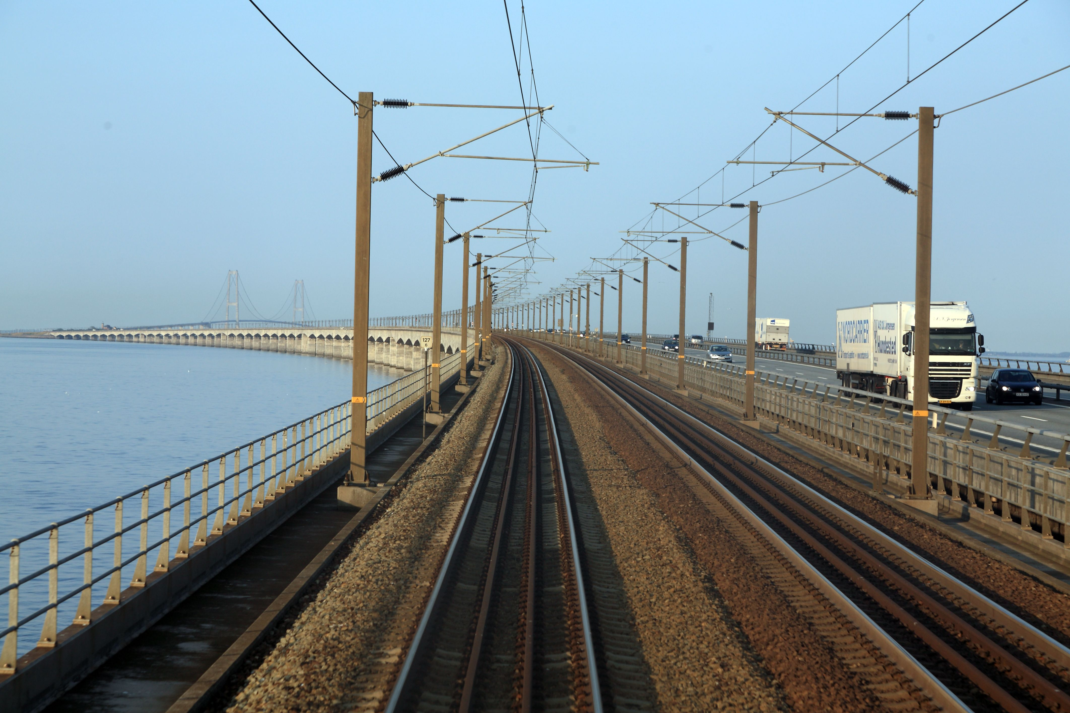 Westbrückenzug mit Fahrbahn, dahinter die Ostbrücke